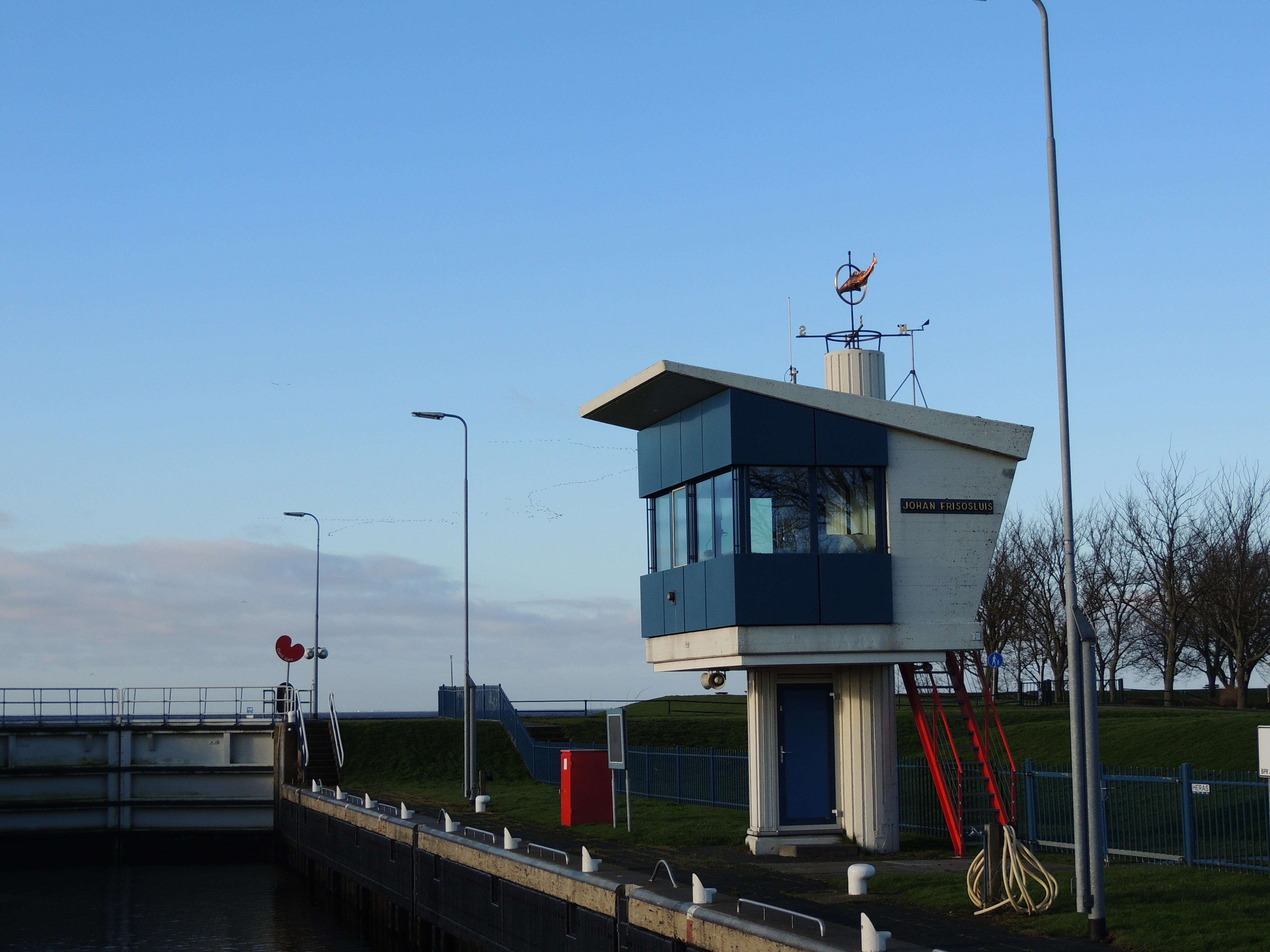 Johan Frisosluis. Stavoren